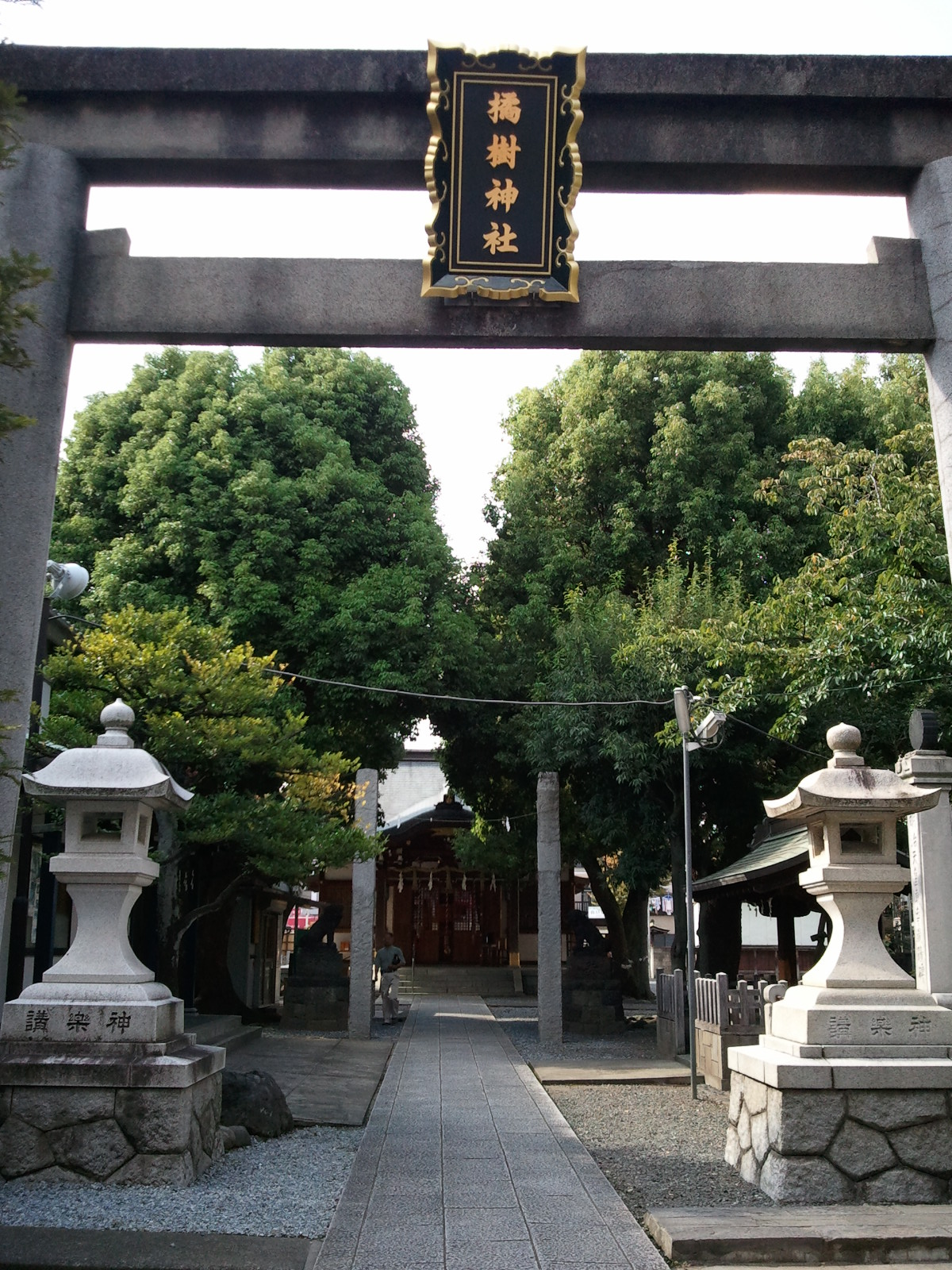 橘樹神社（神奈川県横浜市）